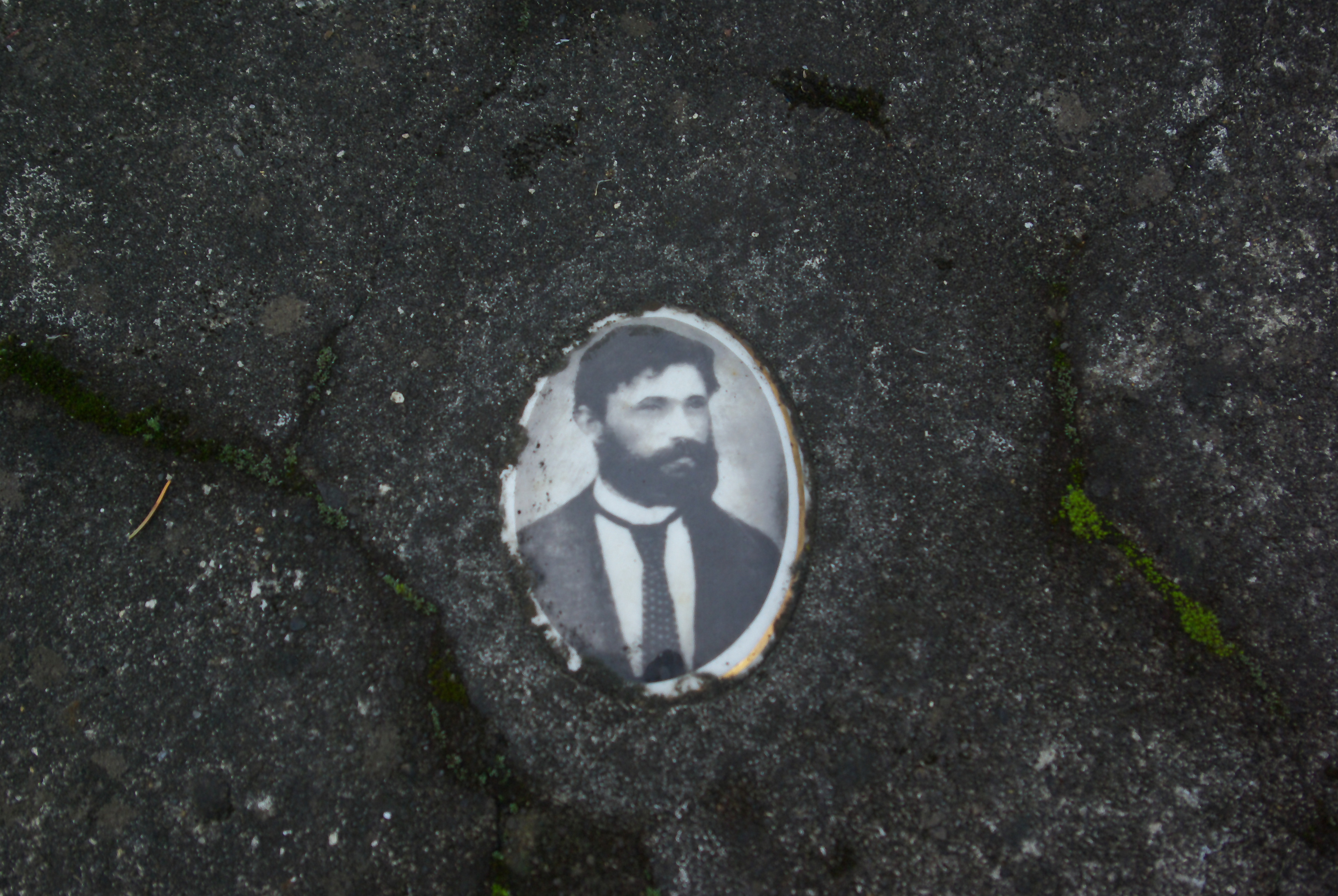 Grobowiec rodziny Konieczków w części „Matejki Stary” Cmentarza Centralnego w Sanoku